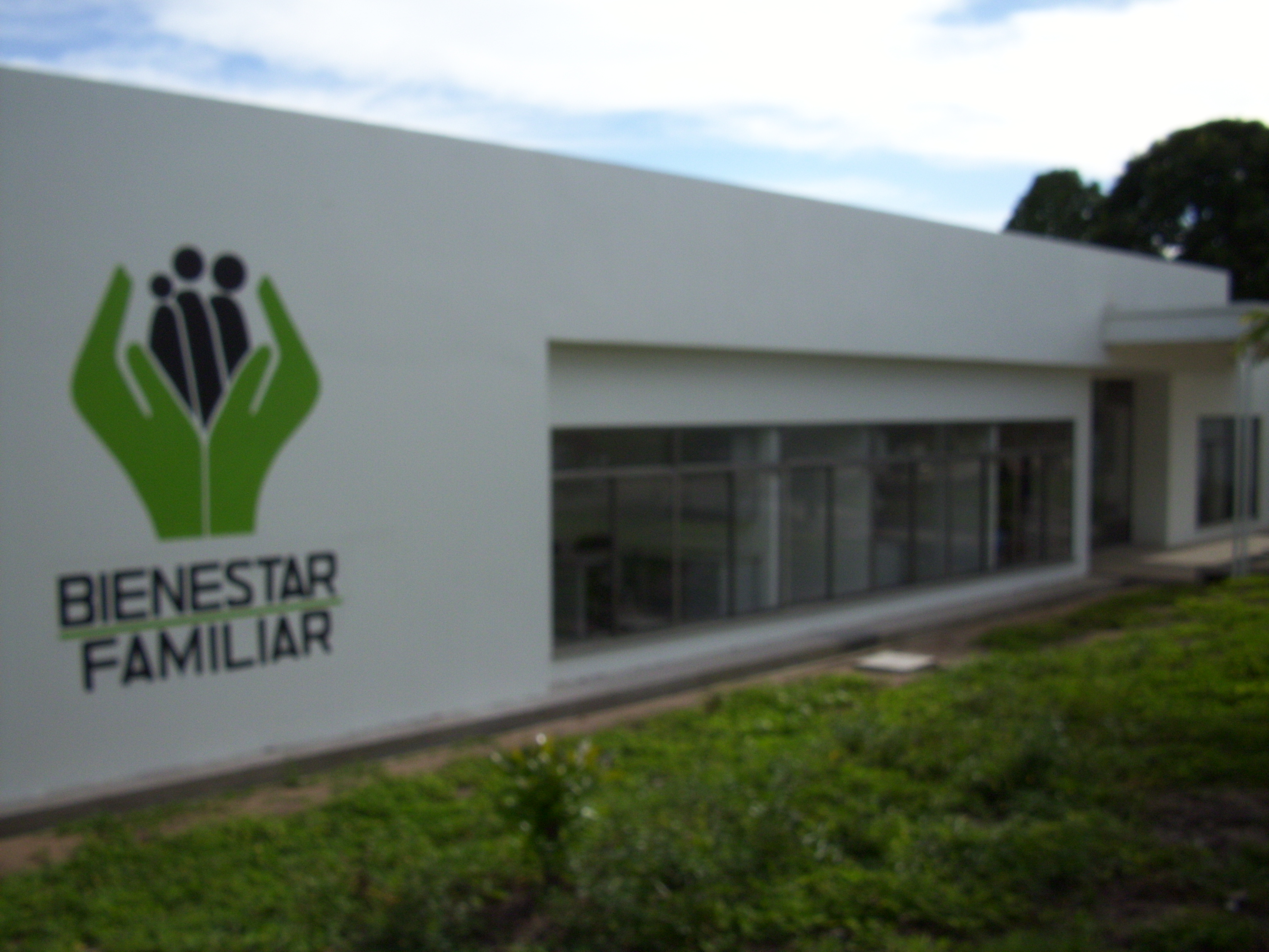 ICBF